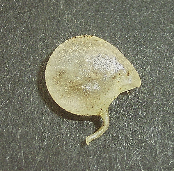 Trap Utricularia humboldtii